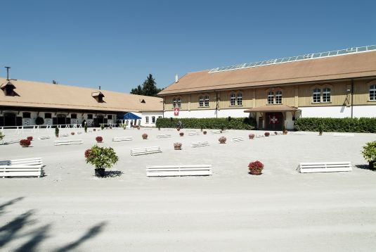 Vue sur la cour du Haras natinal suisse HNS